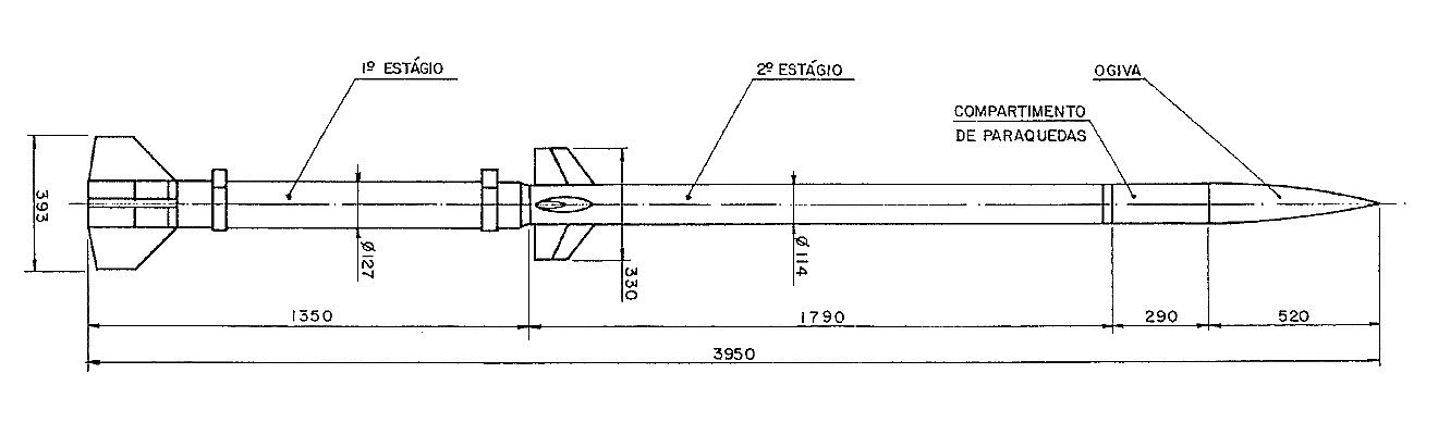 Esquema com as dimensões do foguete Sonda I